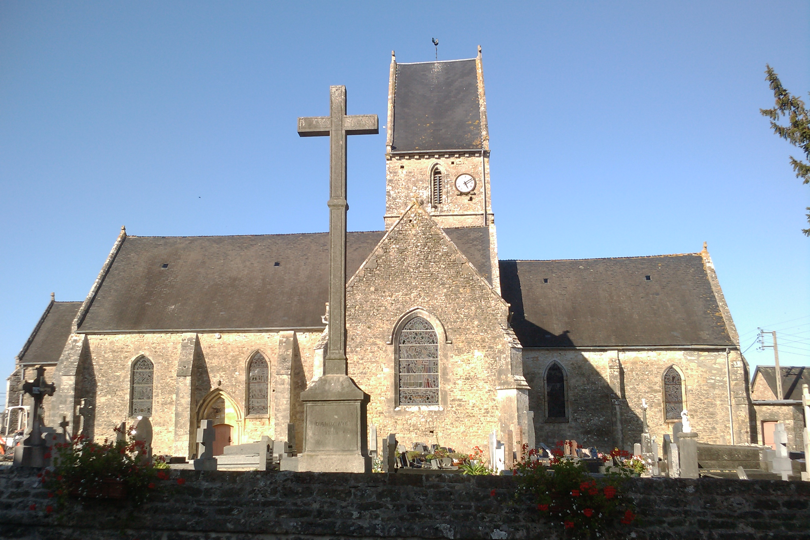 église de Cretteville